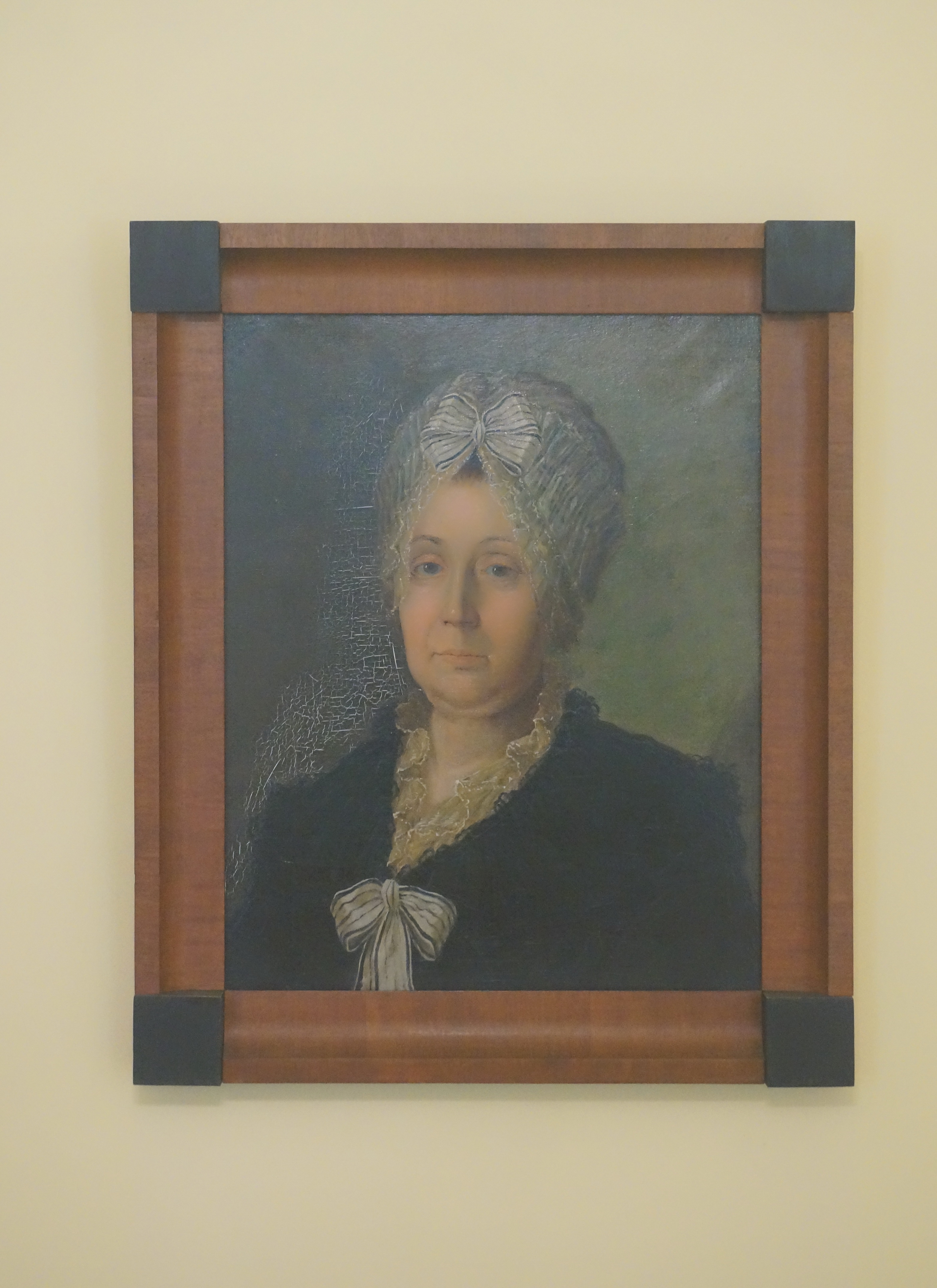 Сарра Юрьевна Пушкин (Ржевская), жена А. Ф. Пушкина. Художник Сердюков, XVIII век Интерьер зальца в господском доме. Музей-заповедник А. С. Пушкина «Болдино»Музей-заповедник А. С. Пушкина «Болдино»